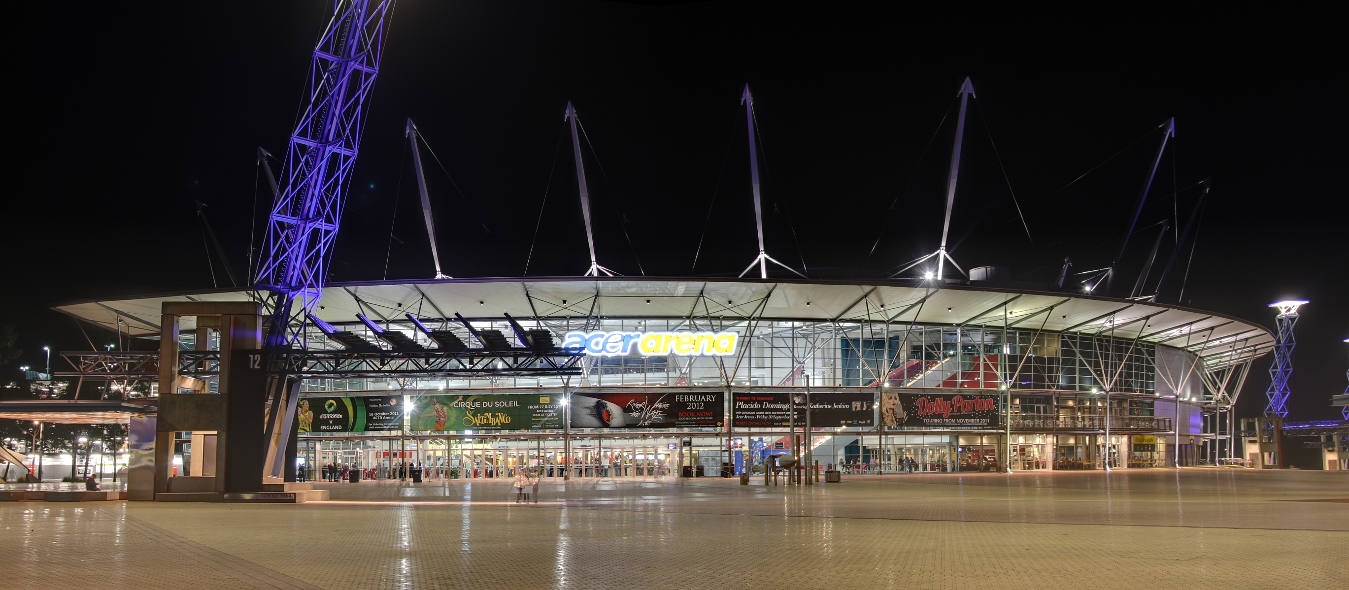 sydney super dome